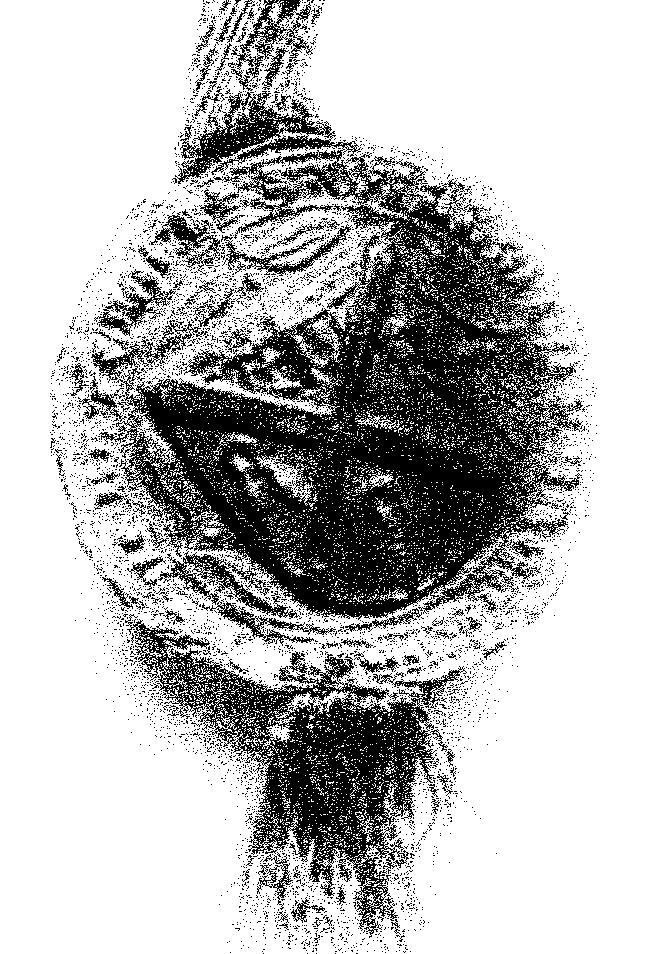 Zegel van Willem van Bronkhorst, heer van Batenburg (oork. 1318) Voorstelling: Een schuinkruis met drie omgekeerde droogscheerdersscharen en in het schildhoofd een leeuwmet een barensteel van vijf hagers, Rond, 32 mm. Afhangend. Geen tegenzegel. Randschrift: + S(IGILLUM) .WILL(EL)MI . DE . BRO(NCHOR)ST . (...) . DE . BATE(N)BORG.